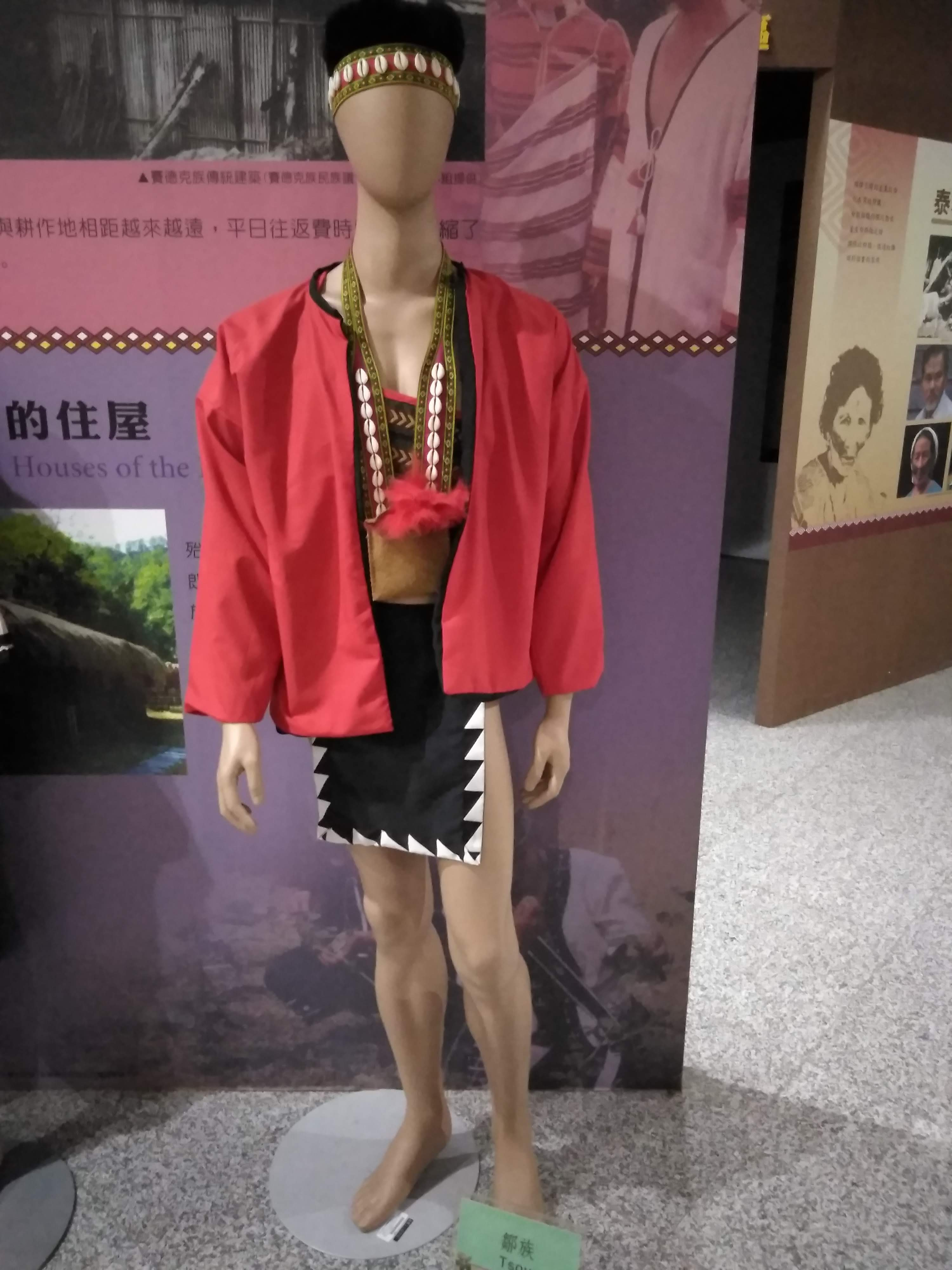 中文（台灣）: 台灣原住民服飾，鄒族(男性)